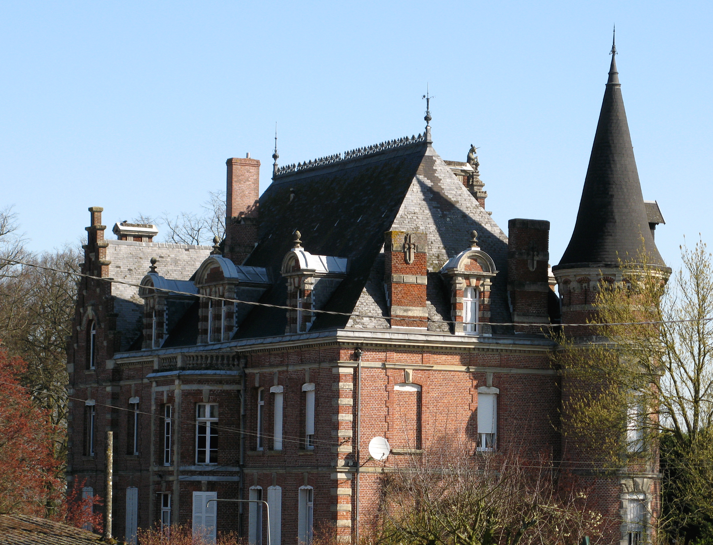 Baizieux (Somme, France) - Le château, aperçu depuis la grande place devant la mairie.